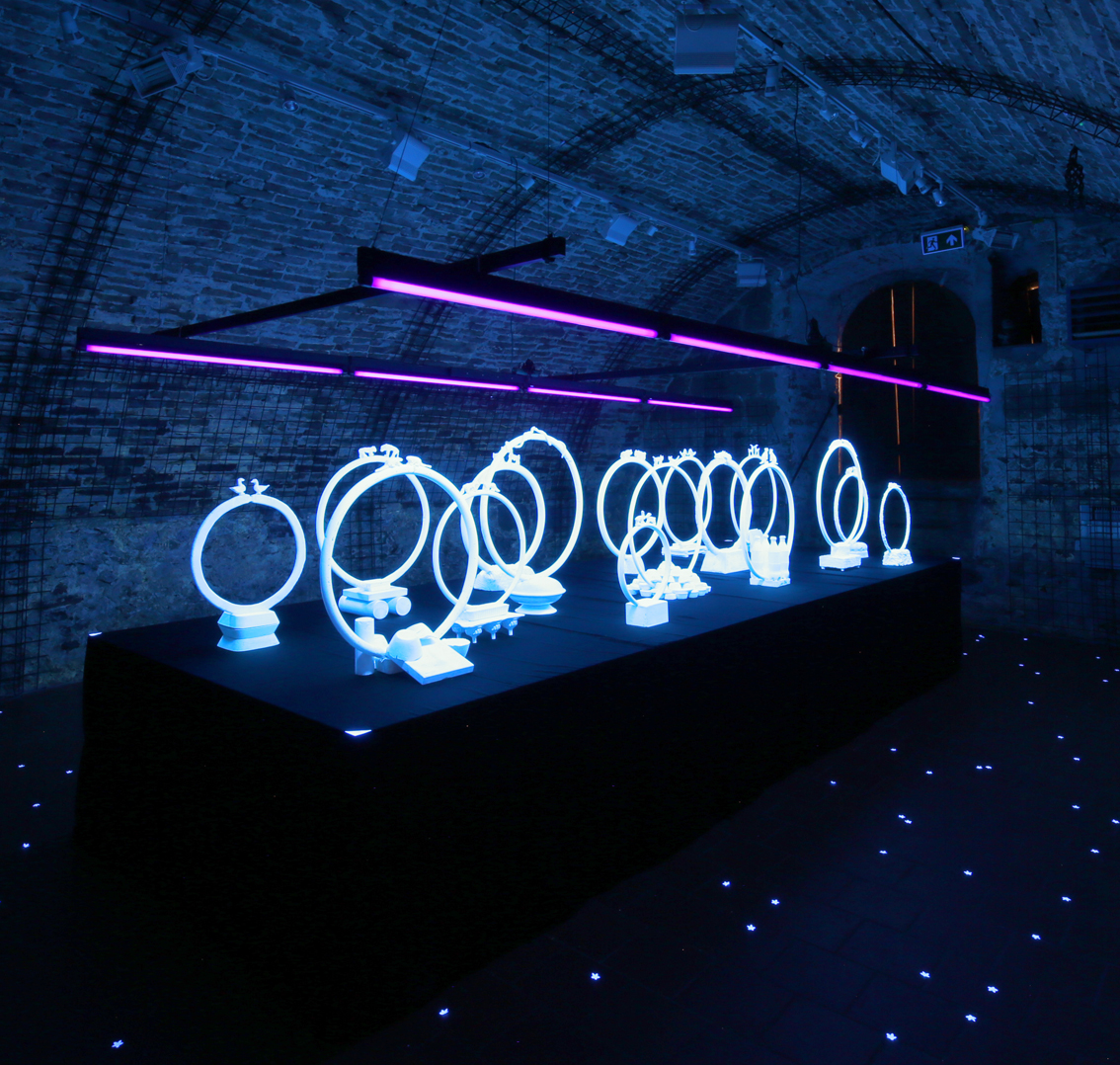 Lichtinstallation Fraubrunnen 2018 Gips und Tonfiguren, mit Schwarzlicht beleuchtet